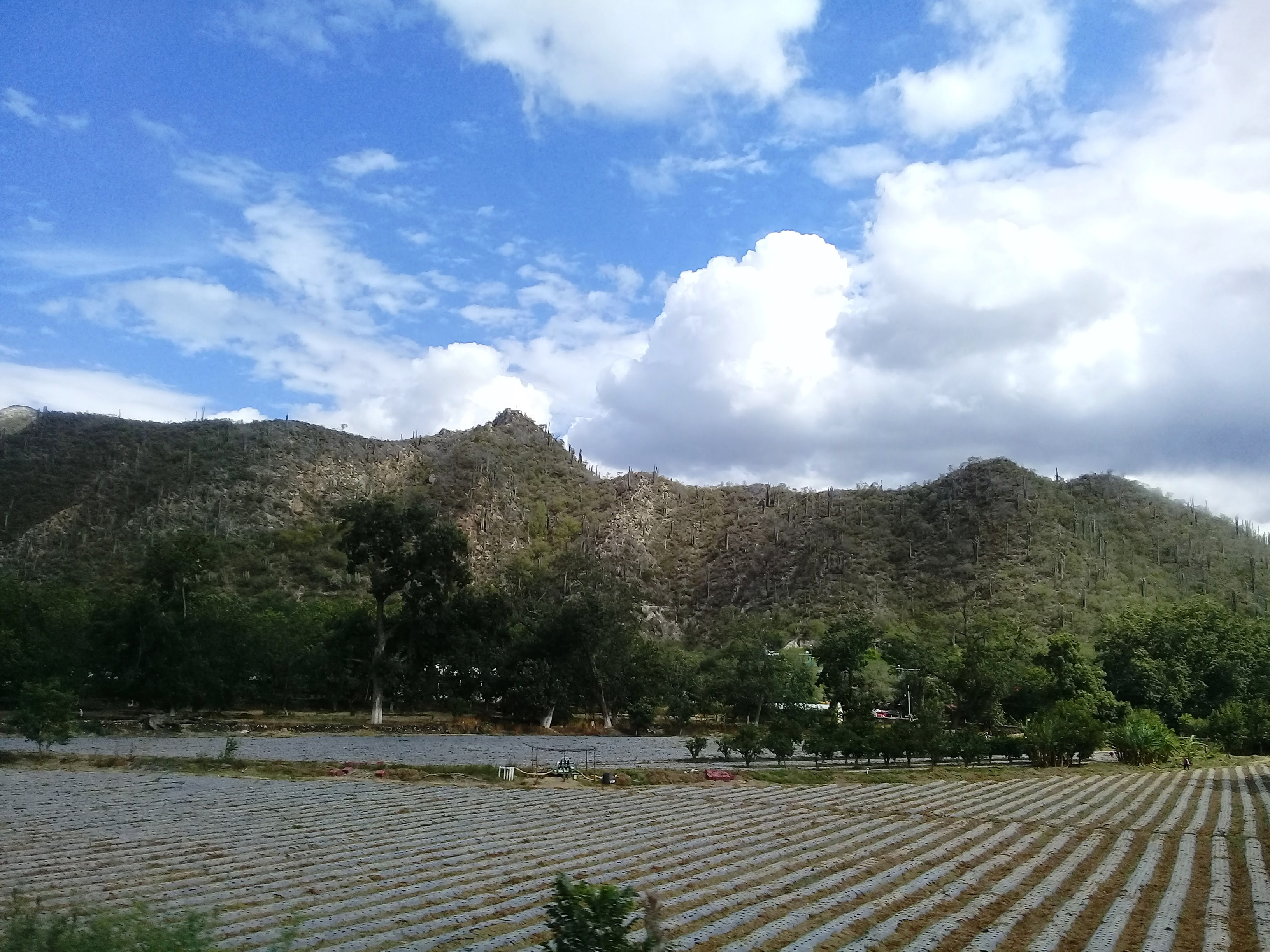 Camino a Metztitlán. 001